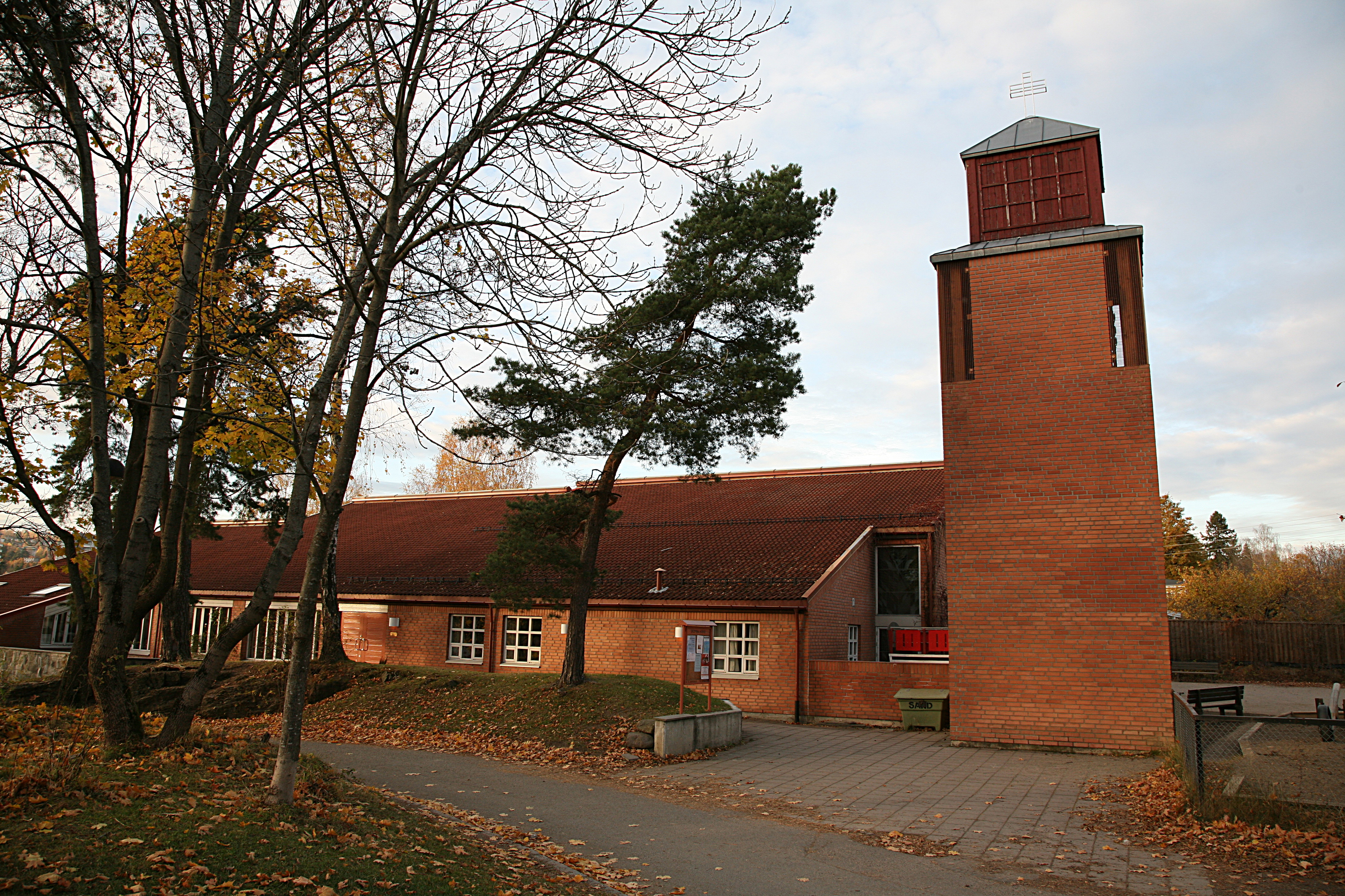 Skøyen kirke. Church in Oslo, Norway.